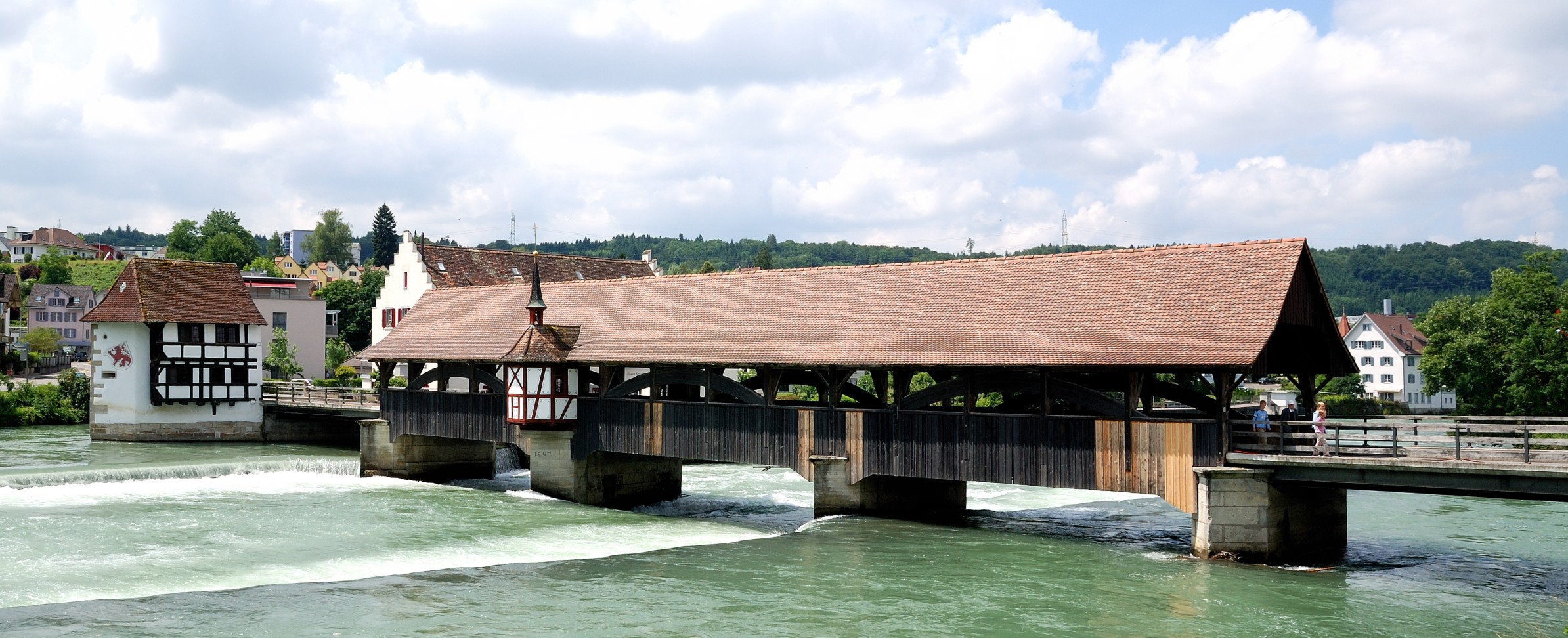 Bremgarten: Holzbrücke über die Reuss